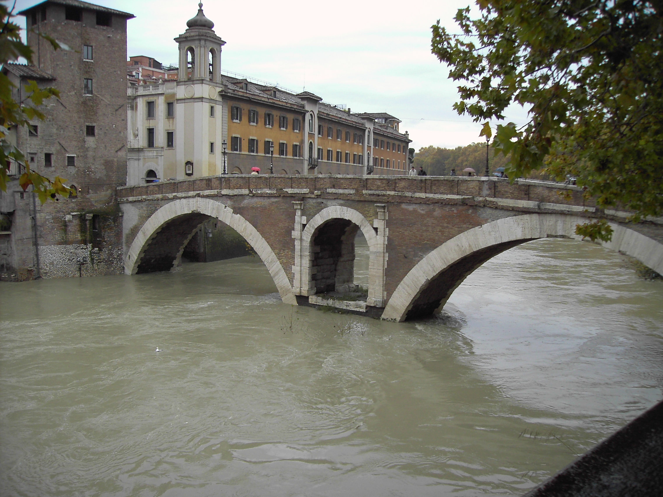 Roma, Tevere in piena a Ponte Fabricio.